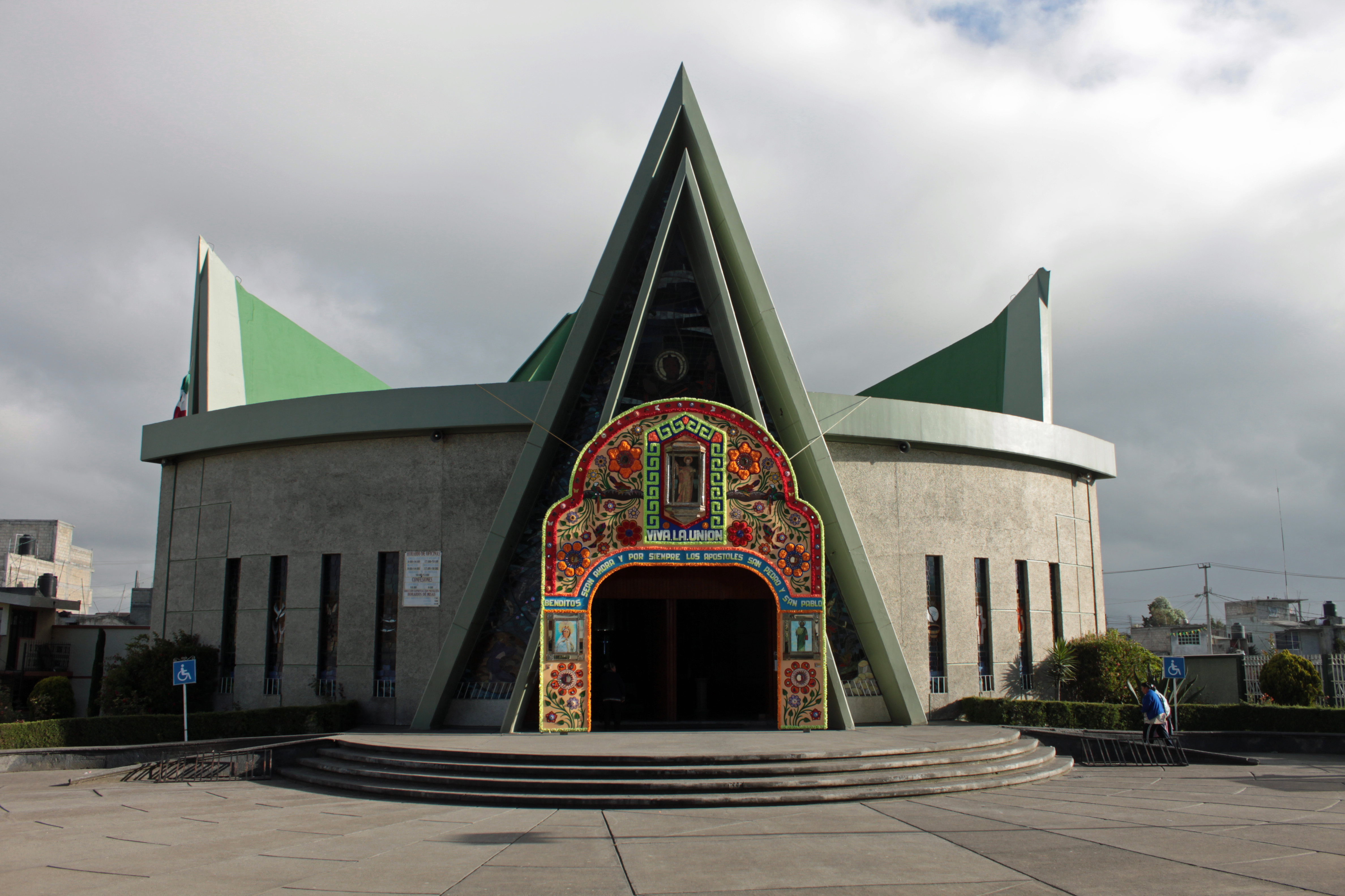 En la ubicación existían dos capillas, una verde con forma de corona y otra capilla tradicional. En esta foto podemos apreciar la verde.